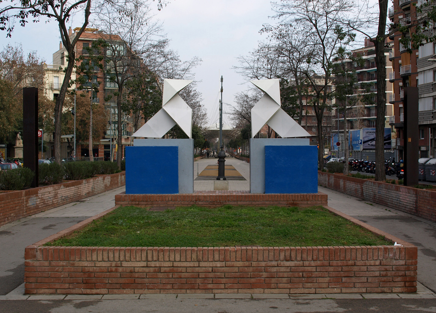 Las Pajaritas (Ramón Acín, 1923 / Julio Luján, 1991)